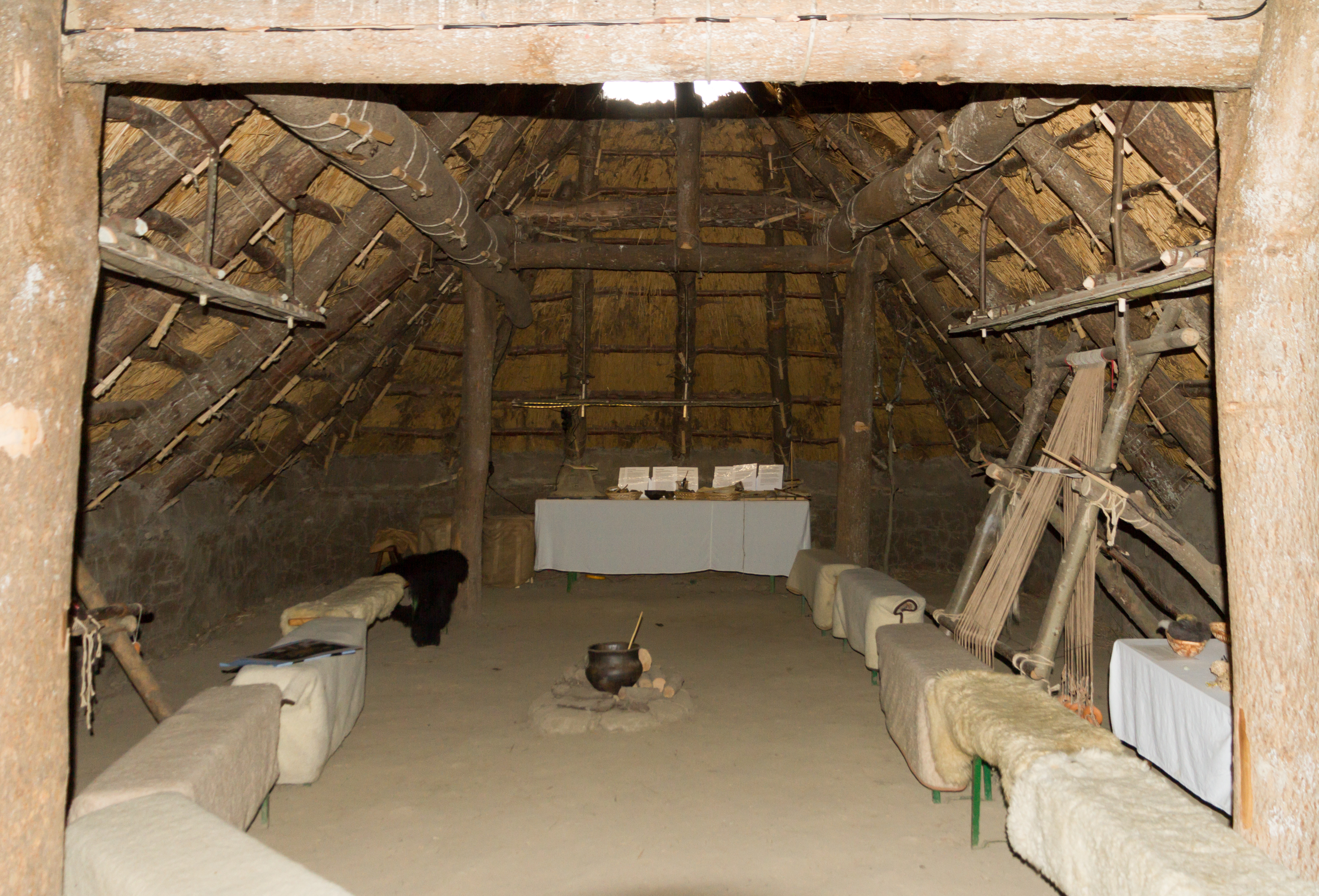 Das Bronzezeithaus Hahnenknoop ist ein Nachbau des ältesten bisher nachgewiesenen Bauernhauses in der deutschen Küstenmarsch aus dem 10. bzw. 9. Jahrhundert v. Chr.